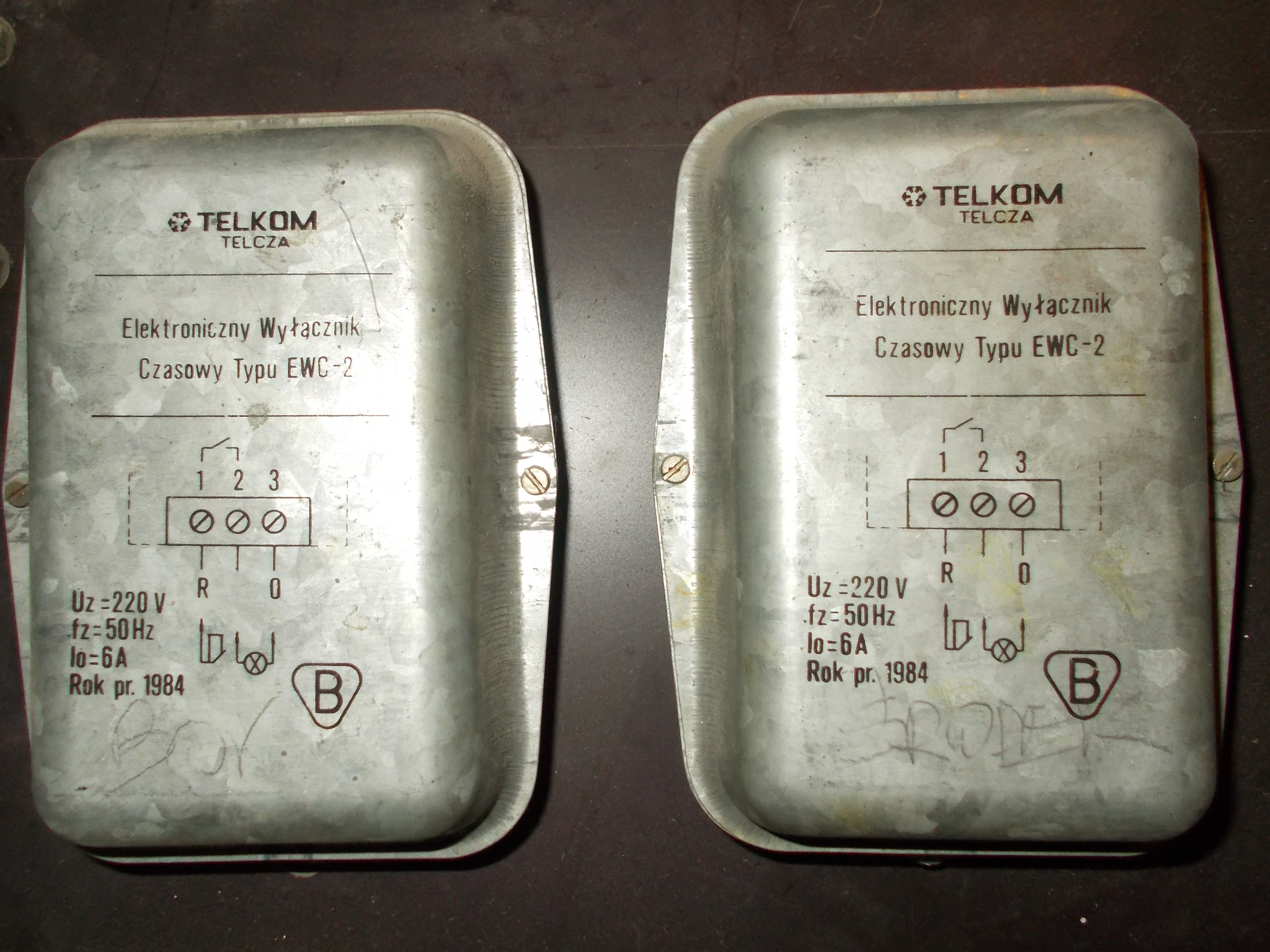 Elektroniczny wyłącznik czasowy. Automat schodowy